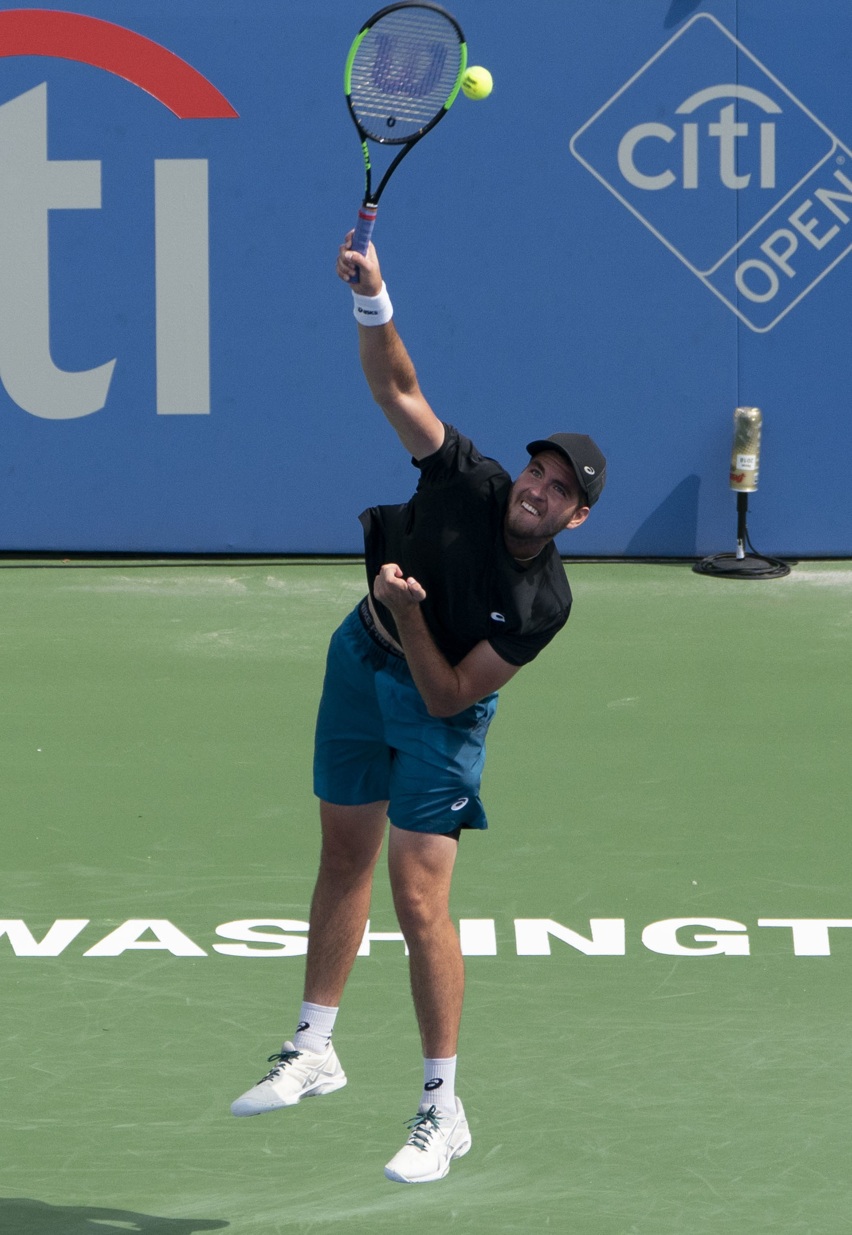 2018 Citi Open Tennis